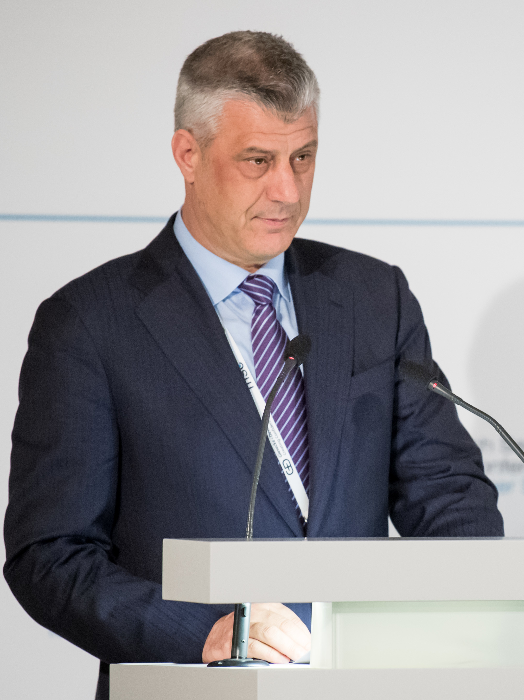 Hashim Thaçi während der Münchener Sicherheitskonferenz 2018